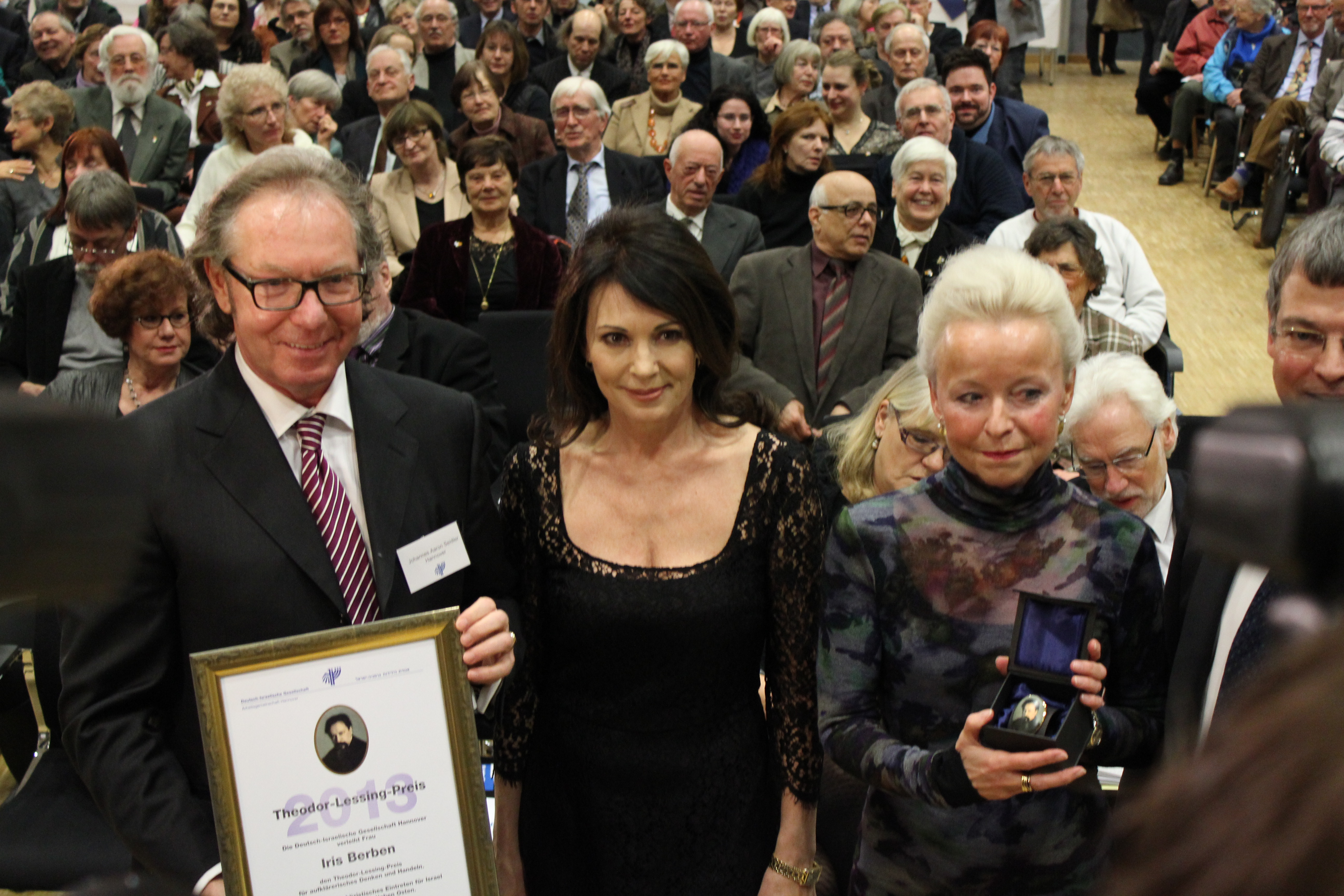 14. Februar 2013 - Verleihung des Theodor-Lessing-Preises an Iris Berben. Die Deutsch-Israelische-Gesellschaft Hannover e.V. verleiht den undotierten Preis an Iris Berben im Regionshaus Hannover. Johannes Aaron Seidler (links), Iris Berben (m.) und Ruth Schwake (rechts).